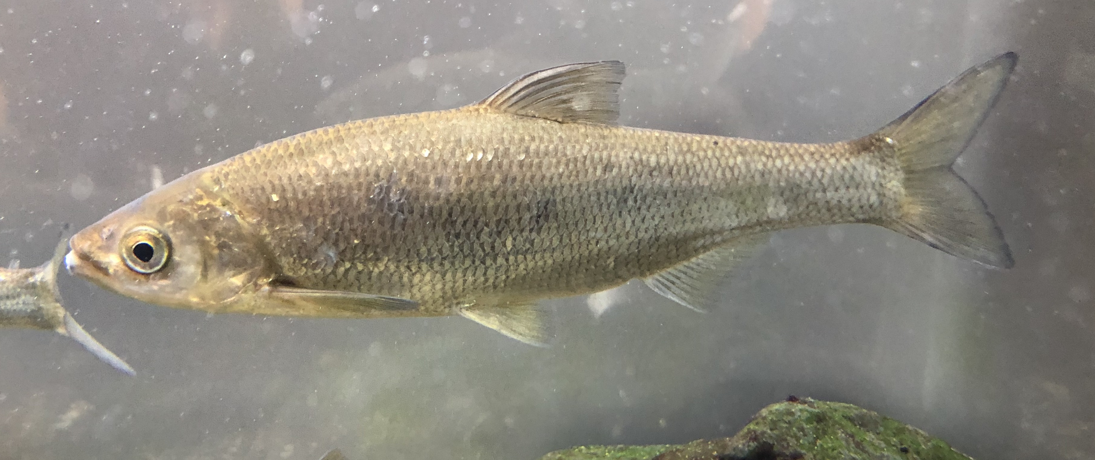 ワタカ。京都水族館飼育個体。